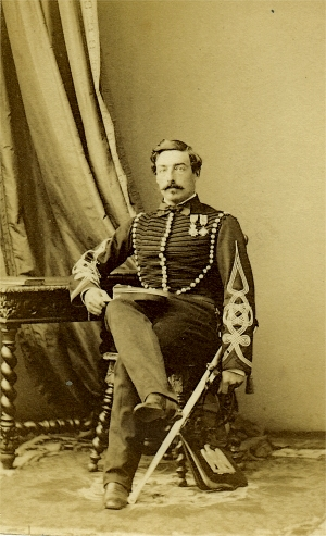 Marie Louis Antonin Viel de Lunas d'Espeuilles en hussard, photo carte de visite, date imprécisée (vers 1861 ?) d'Adolphe Disdéri.